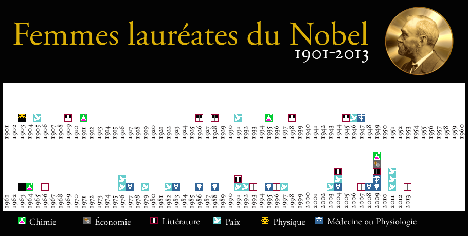 Carte des prix Nobel gagnés par des femmes, par année